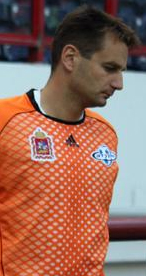 Antonin Kinsky